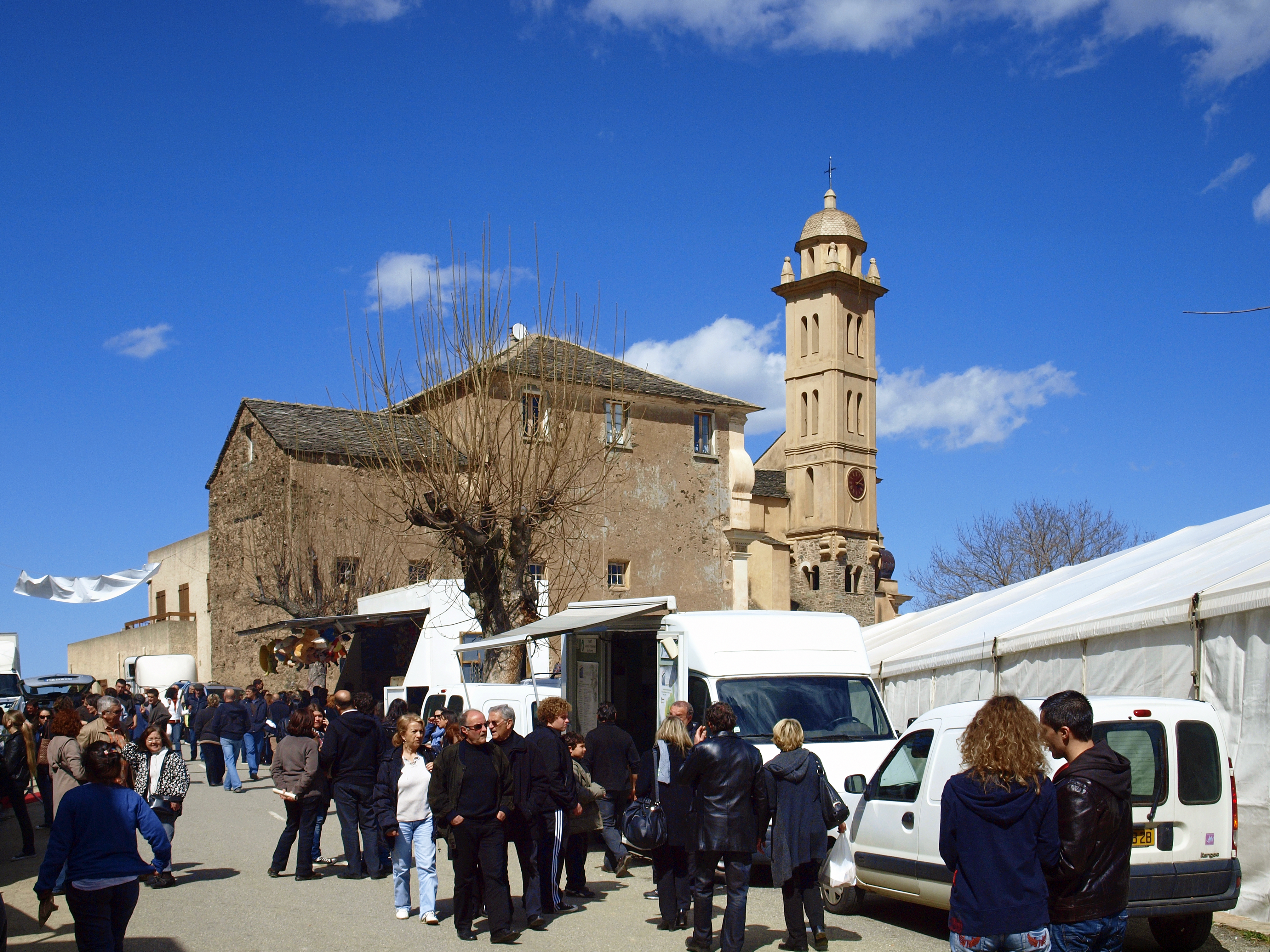 Piedicroce (Corsica) - Merendella du lundi pascal (fête locale) sur la place de l'église